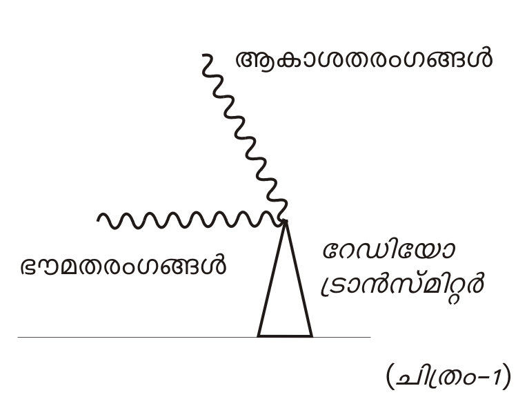 മീഡിയം വേവ് ബാൻഡിൽ തരംഗങ്ങൾ സഞ്ചരിക്കുന്നത്.